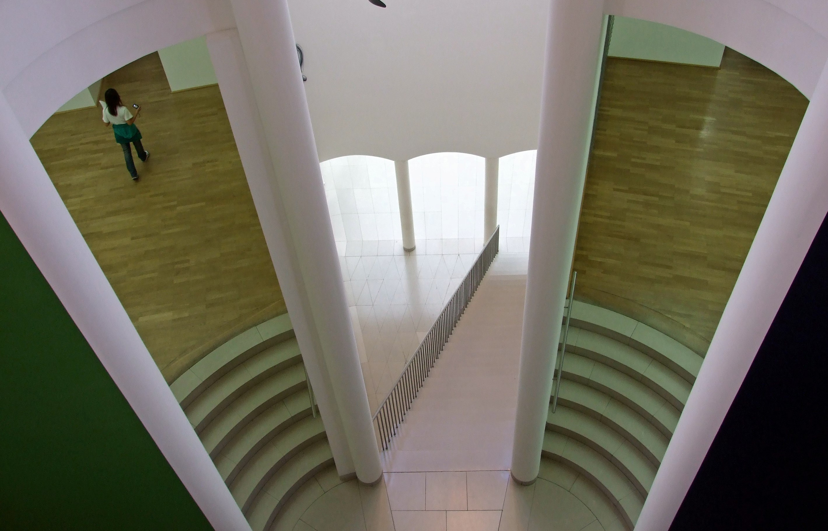 MMK, Innenansicht von einem Balkon